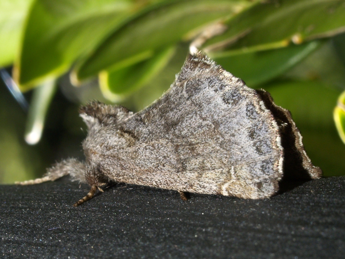 Rhegmatophila alpina